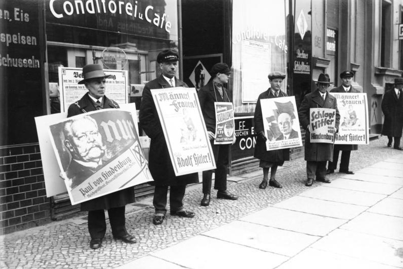 Der Schlussakt der Reichspräsidentenwahl am 10. April 1932! Die Plakatträger stehen einträchtig mit den Bildern ihrer Kandidaten vor den Wahl-Lokalen in Berlin